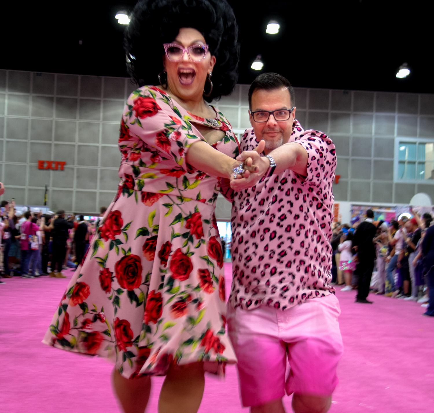 Rupaul DragCon 2019 - Los Angeles